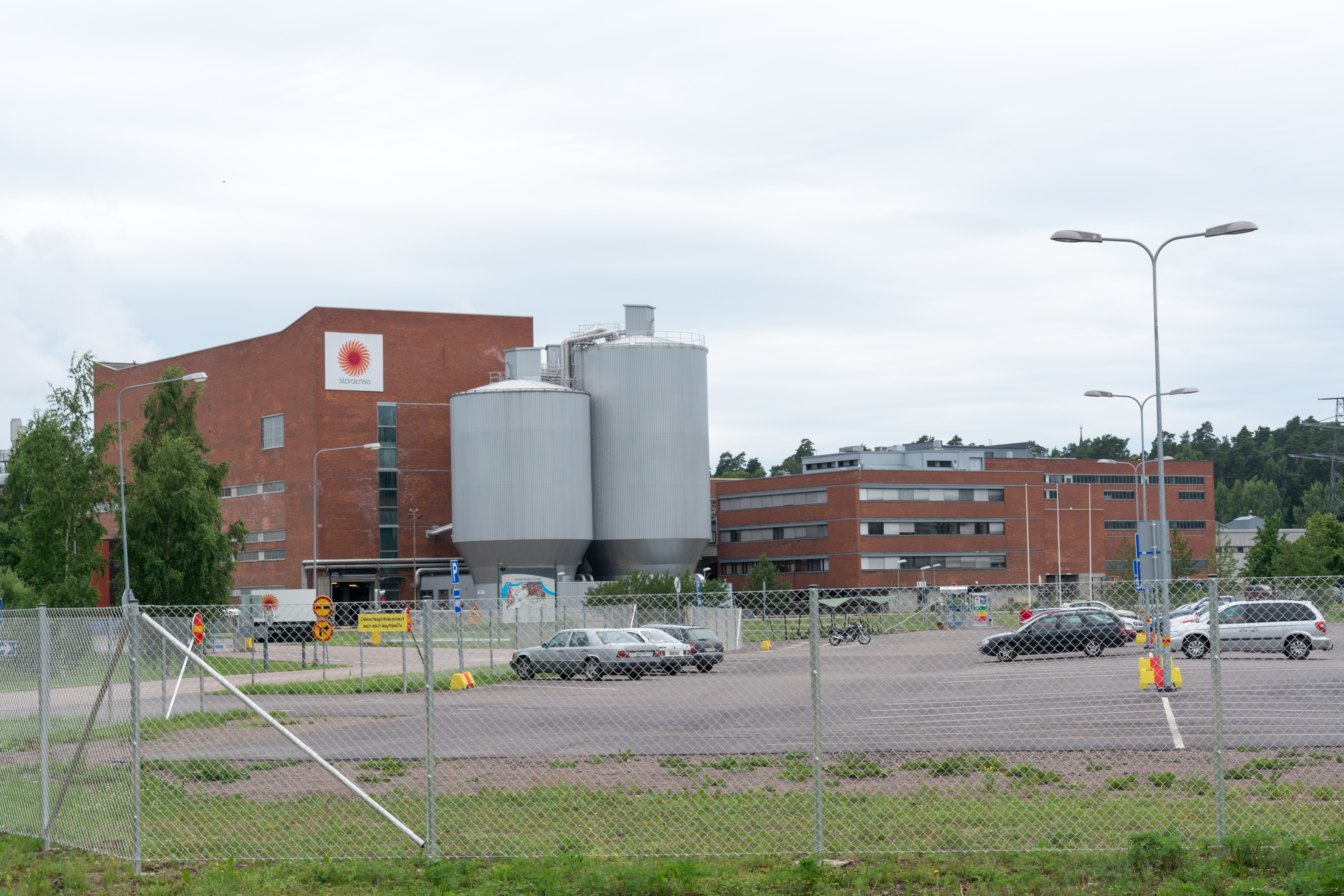 Inkeroisten kartonkitehdas, Kouvola